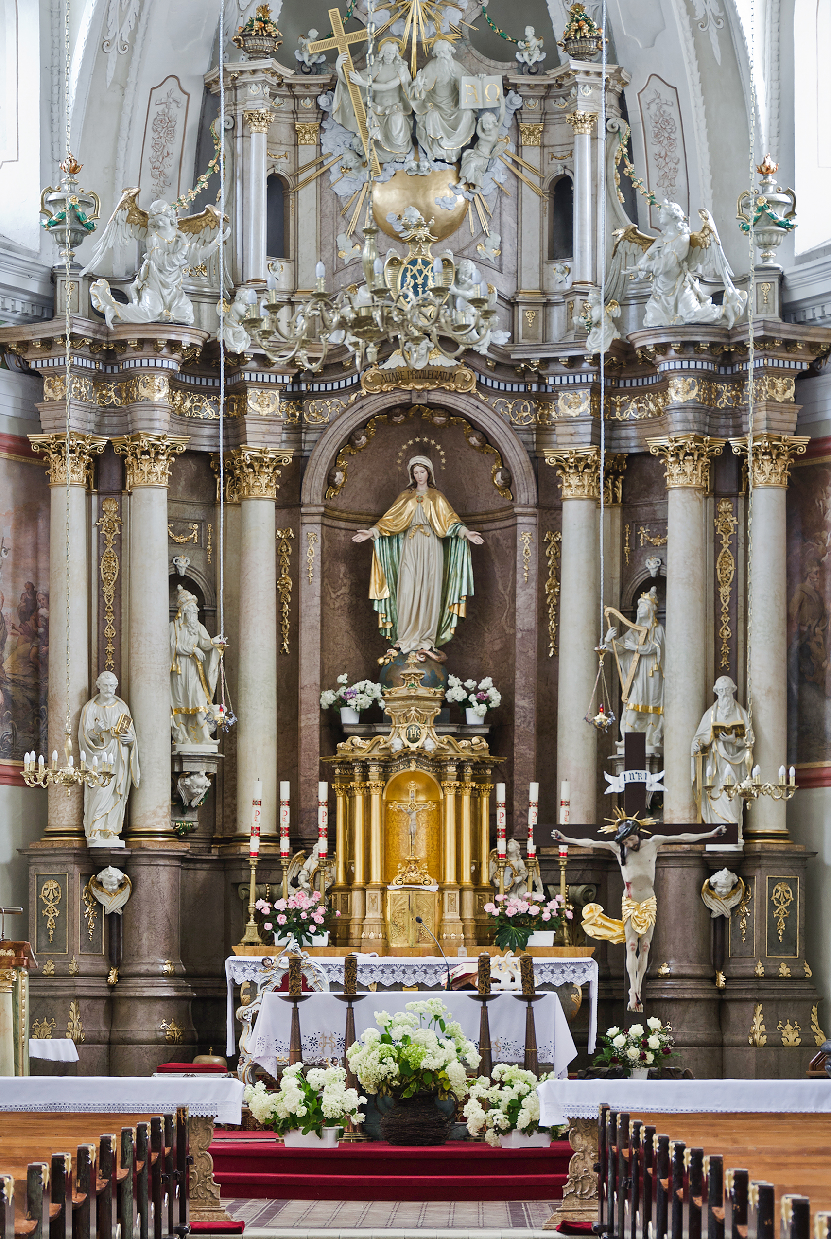 Lądek-Zdrój, kościół par. p.w. Narodzenia NMP, XVII